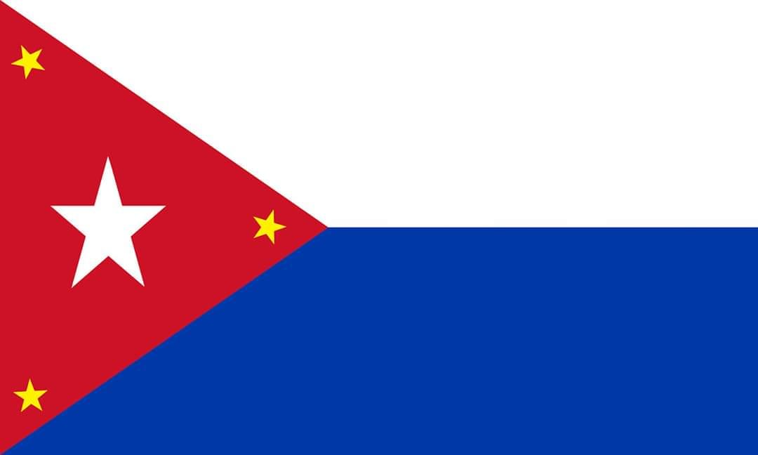 Bandera anticomunista y anticastrista